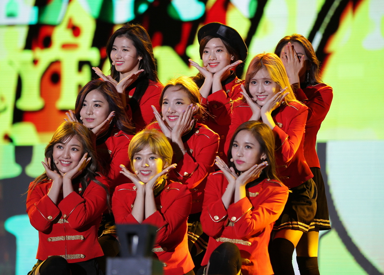 트와이스(TWICE) G페스티벌 아시아 드림 콘서트